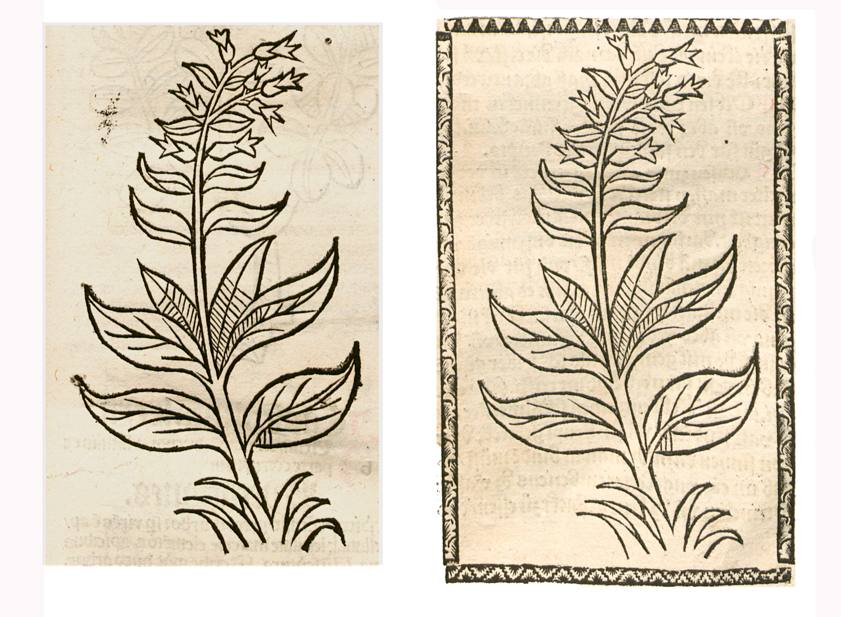 Abbildung von: Ochsen Zung (Anchusa arvensis)